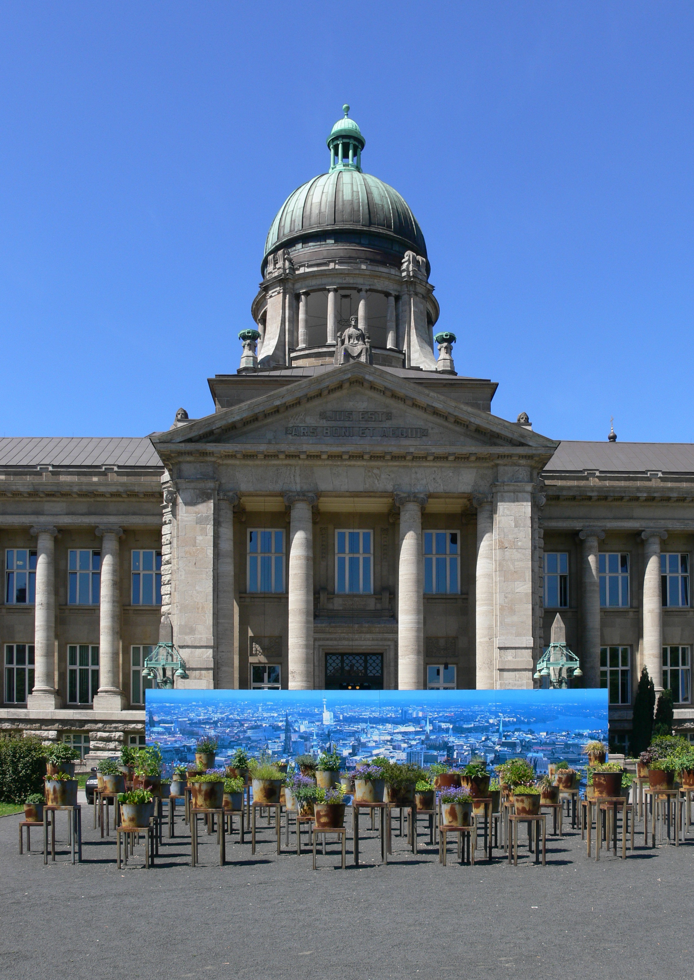 Hamburg, Hanseatisches Oberlandesgericht, im Vordergrund Mahnmal zum Gedenken an die Opfer der nationalsozialistischen Justiz Gloria Friedmann: "Hier + Jetzt" - den Opfern nationalsozialistischer Justiz in Hamburg, 1997